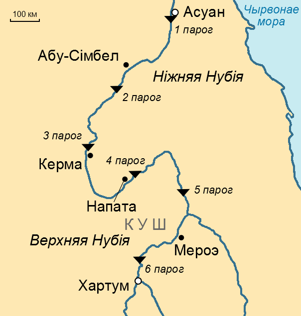 Карта Нубіі на беларускай мове